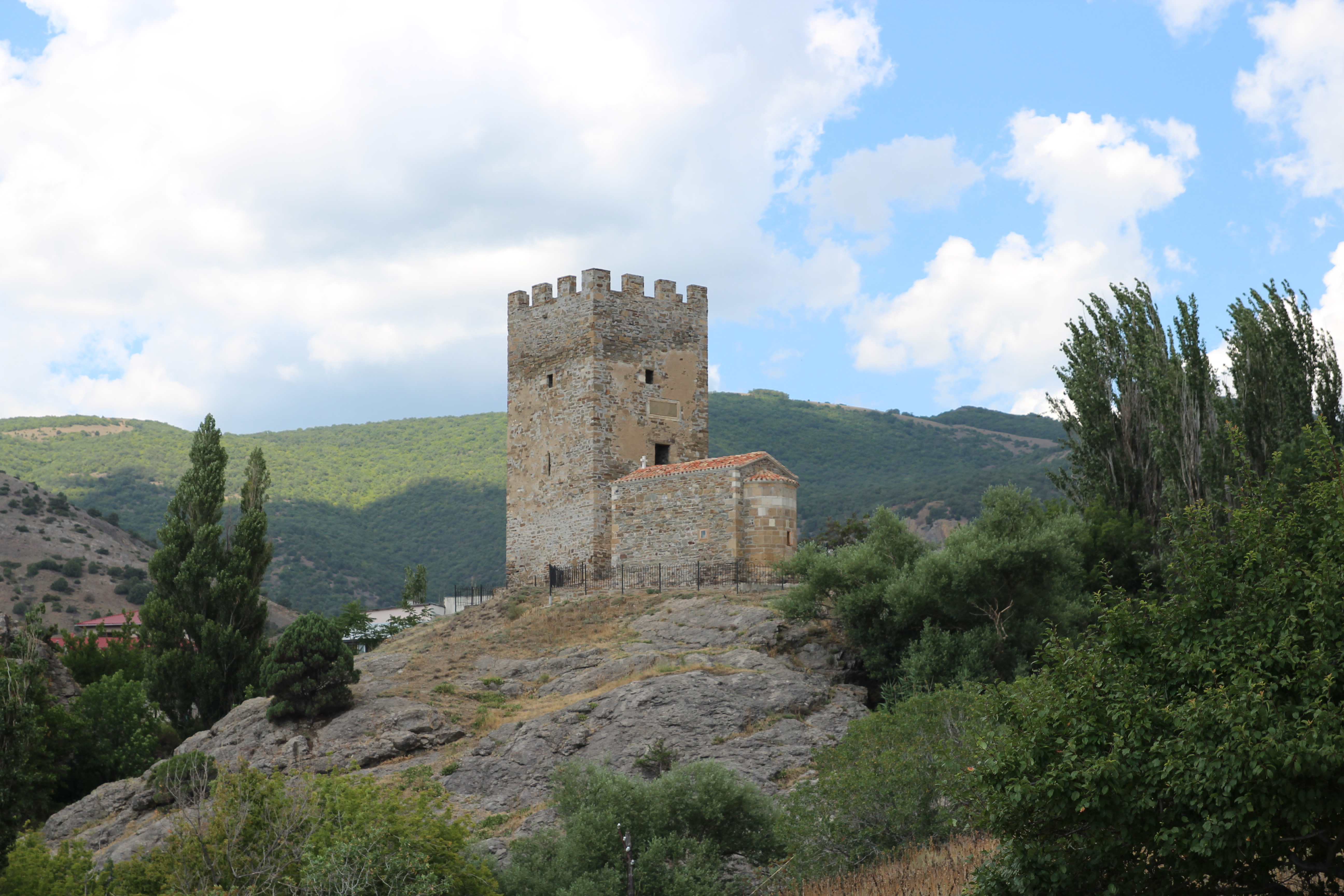 Портовая башня и храм 12 апостолов.JPG